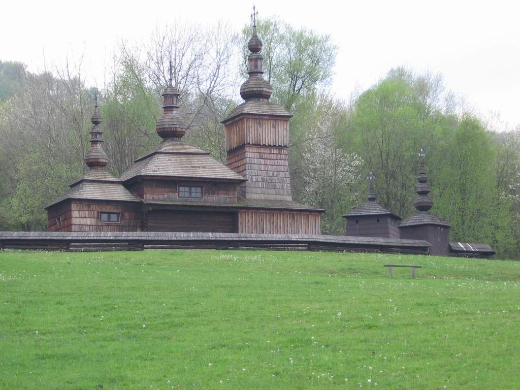 Small wooden Ruthenian church in Svidnik skansen.